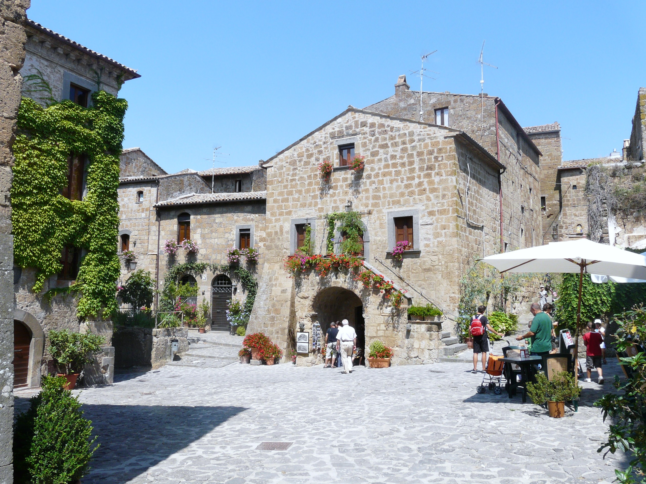 Civita di Bagnoregio, Bagnoregio, Lazio, Italia